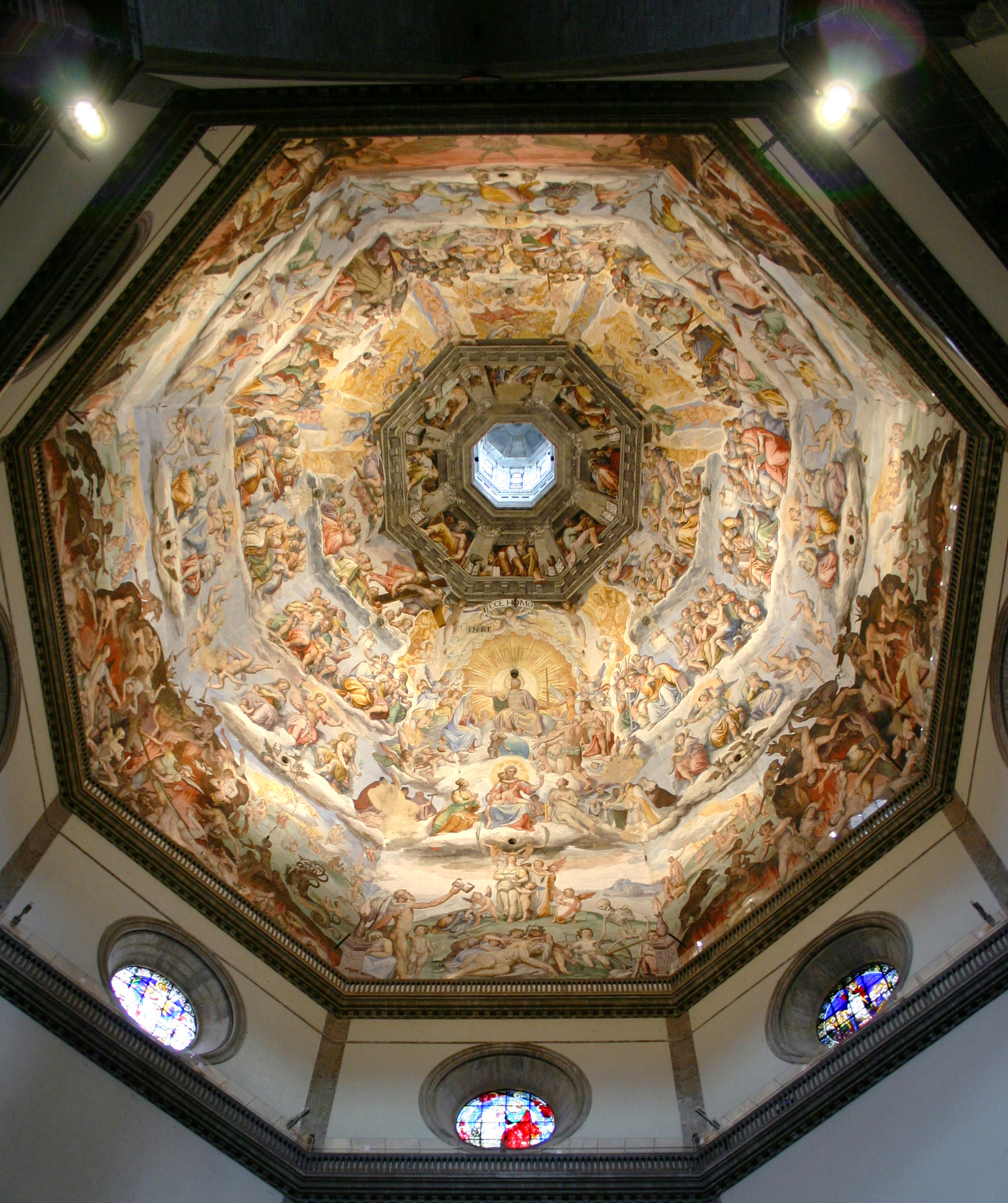 Dom von Florenz, Kuppelfresko